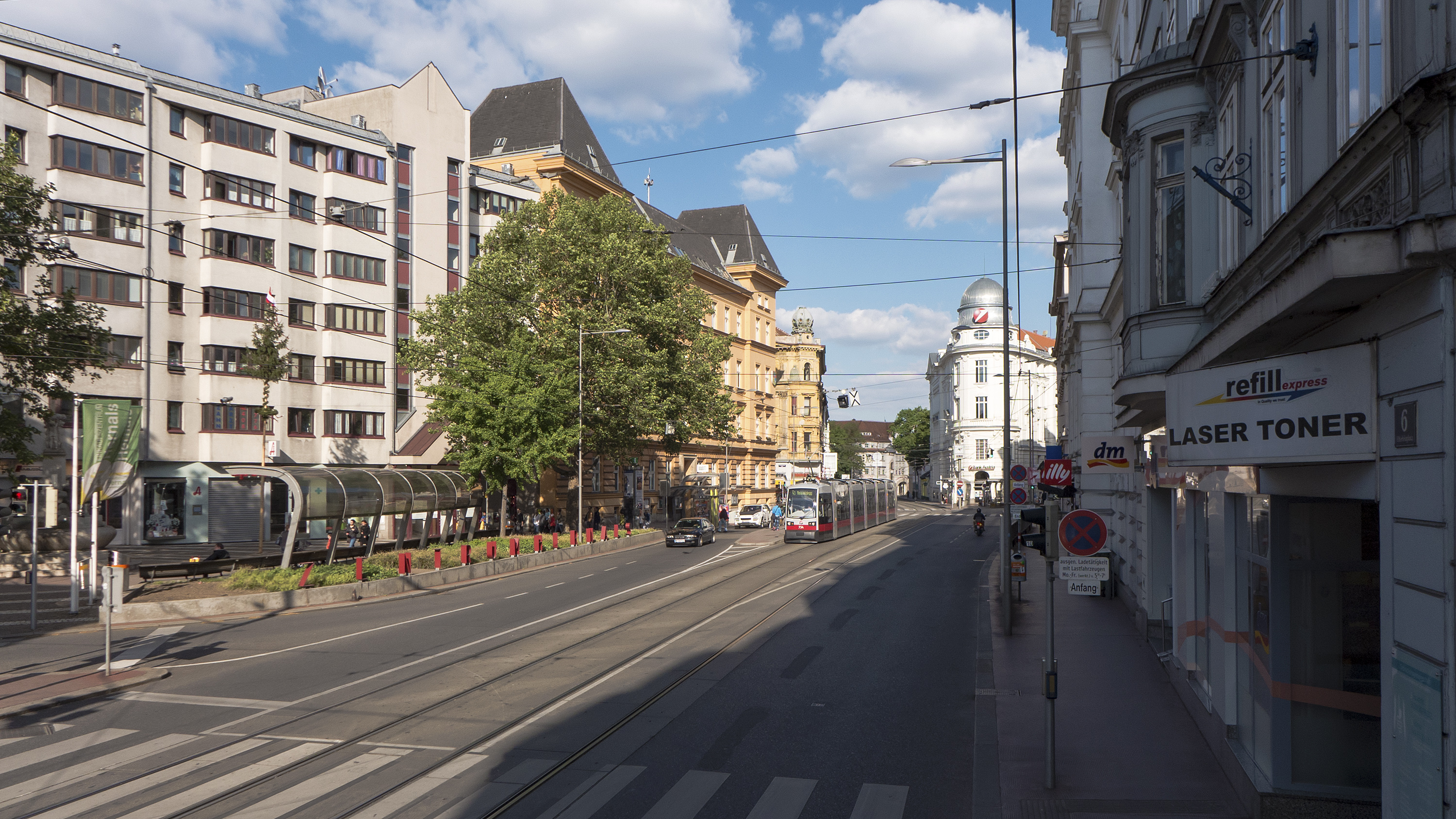 Elterleinplatz in Wien 17 Richtung Osten